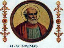 Pope Zosimus